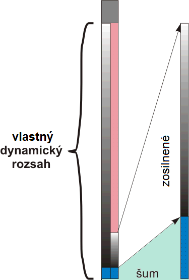 Dynamický rozsah obrazového snímača a dopad zosilnenia